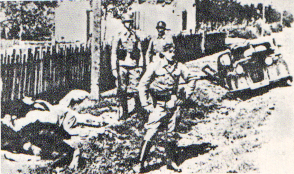 Srpskohrvatski / српскохрватски: Nemački masakr u nepoznatom selu u Srbiji (verovatno Skela), tokom ustanka 1941. Snimci nađeni kod Nemaca.